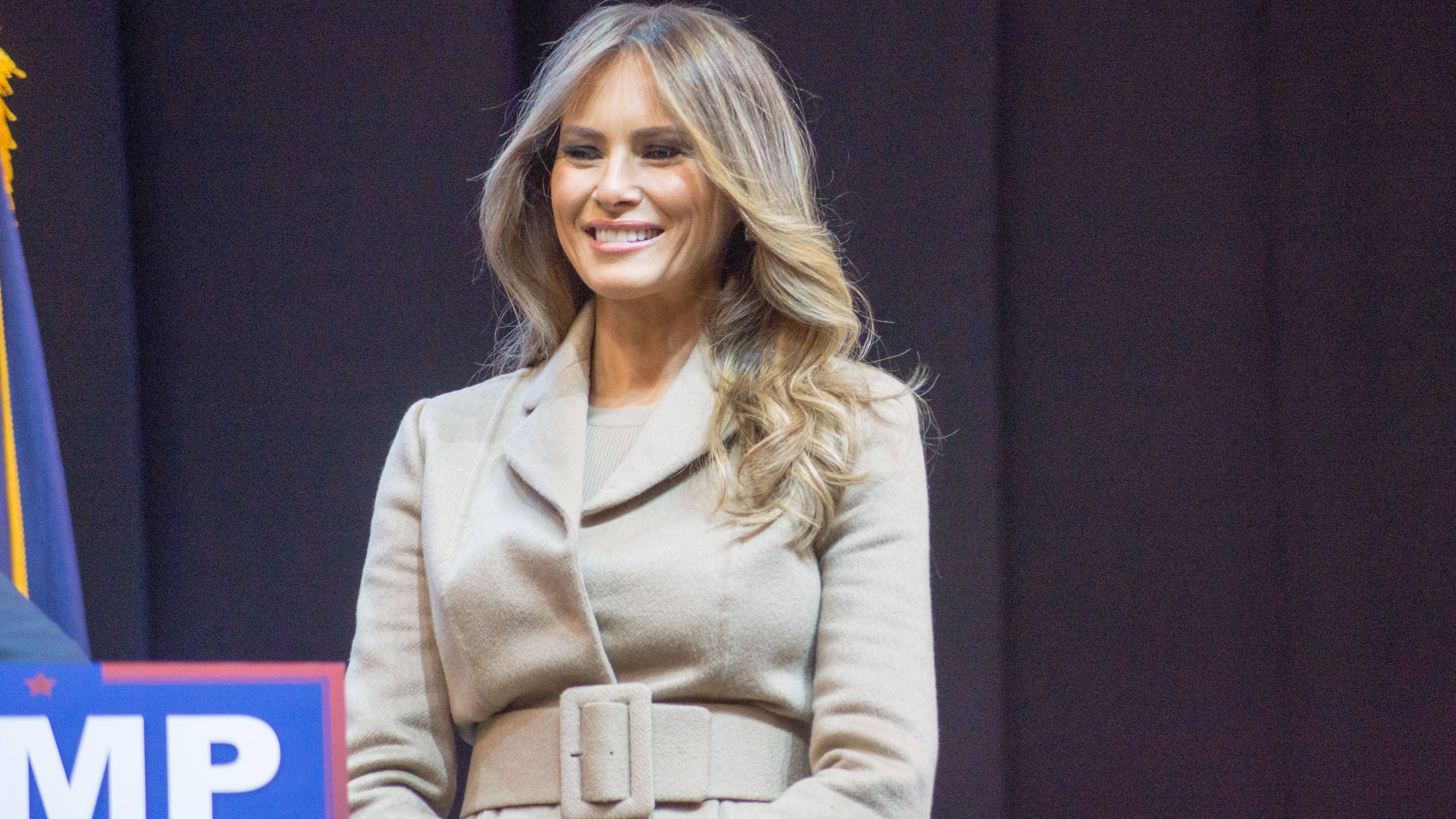 20160208-DSC08093